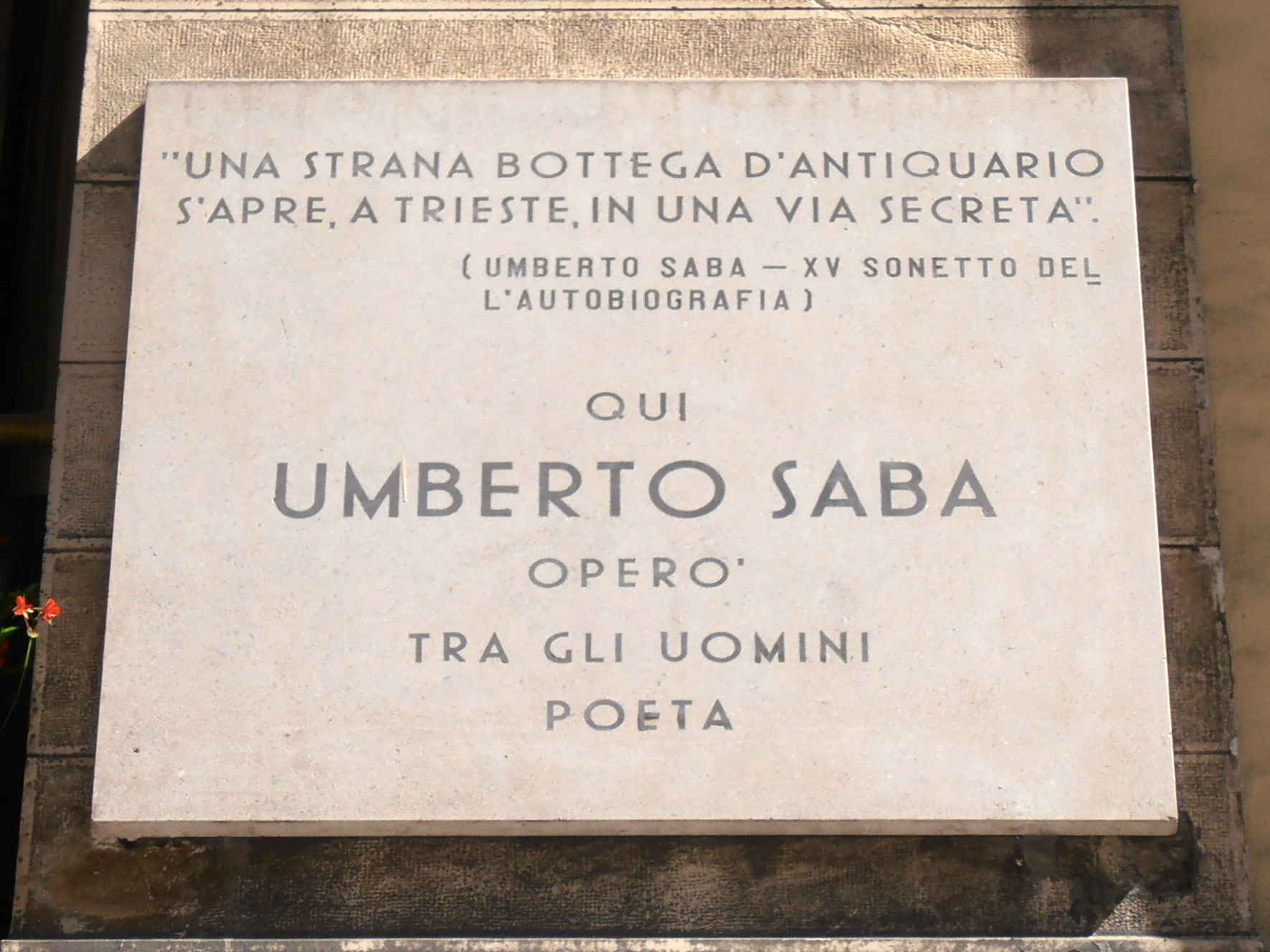 Italy - Trieste - Via San Nicolò - Targa a Umberto Saba nei pressi della libreria antiquaria